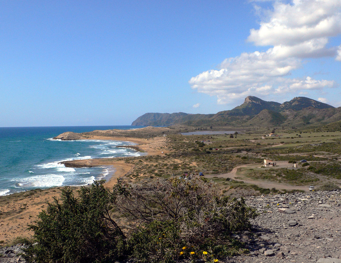 Vista general del Parque Natural de Calblanque en Cartagena (España).